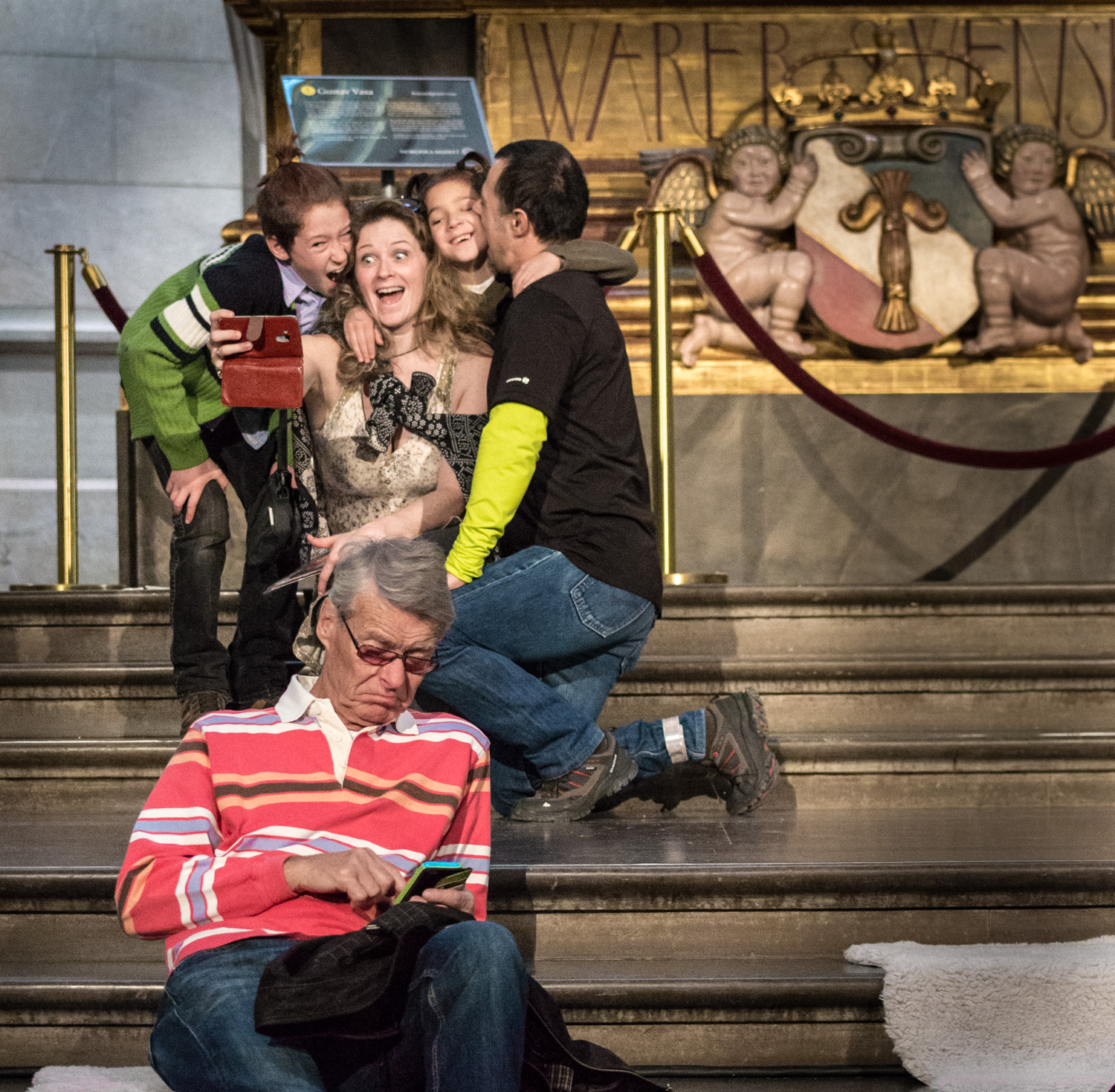 Selfie på Nordiska museet i Stockholm 2016.